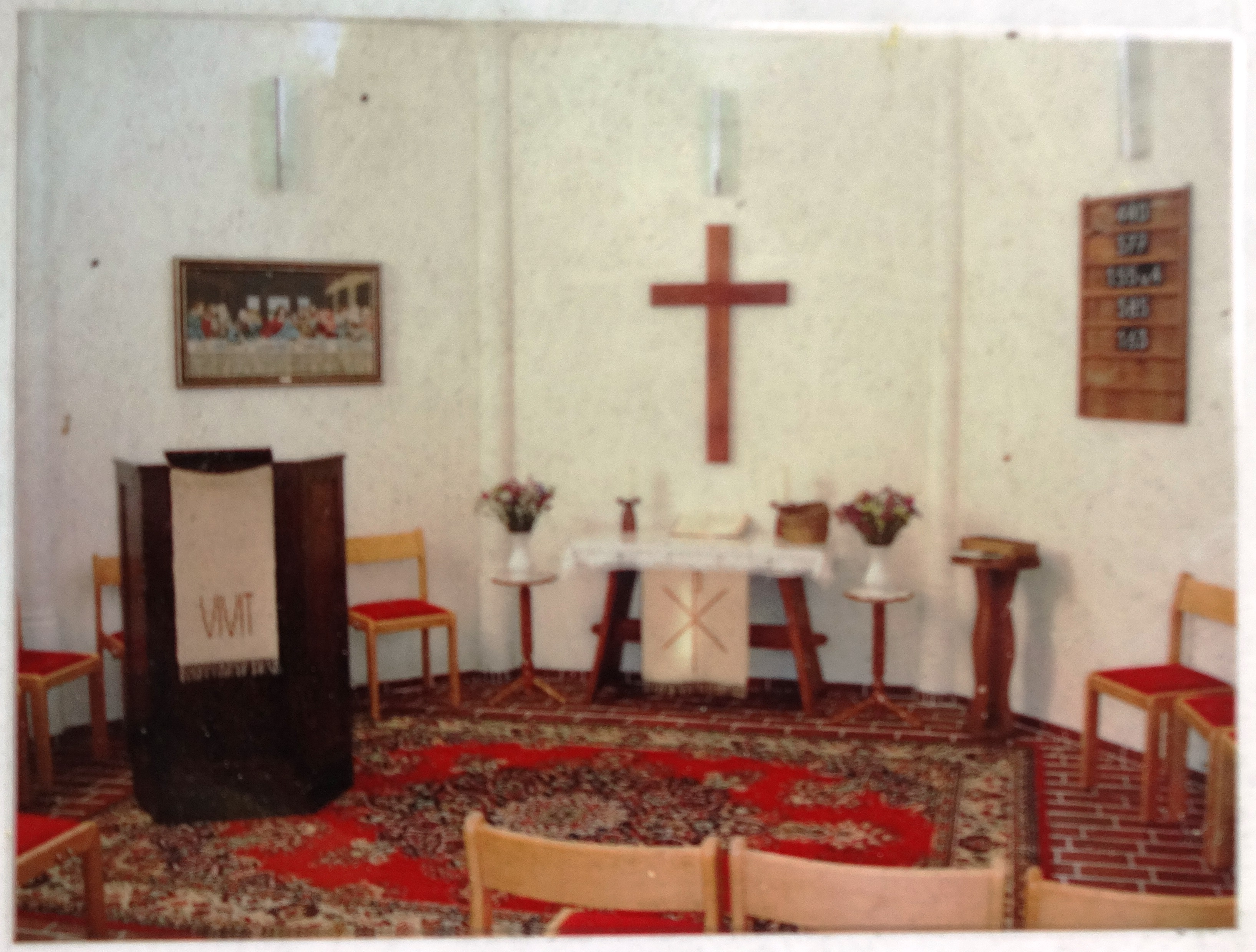 Die neuromanische Saalkirche in Niederjesar entstand 1859 nach Plänen von Friedrich-August Stüler. Im Zweiten Weltkrieg wurde der Turm gesprengt und das Bauwerk verfiel. Nach der Wende wurde die Kirche gesichert, instandgesetzt und umgebaut. Sie dient seit 2002 als kommunales und kirchliches Zentrum.